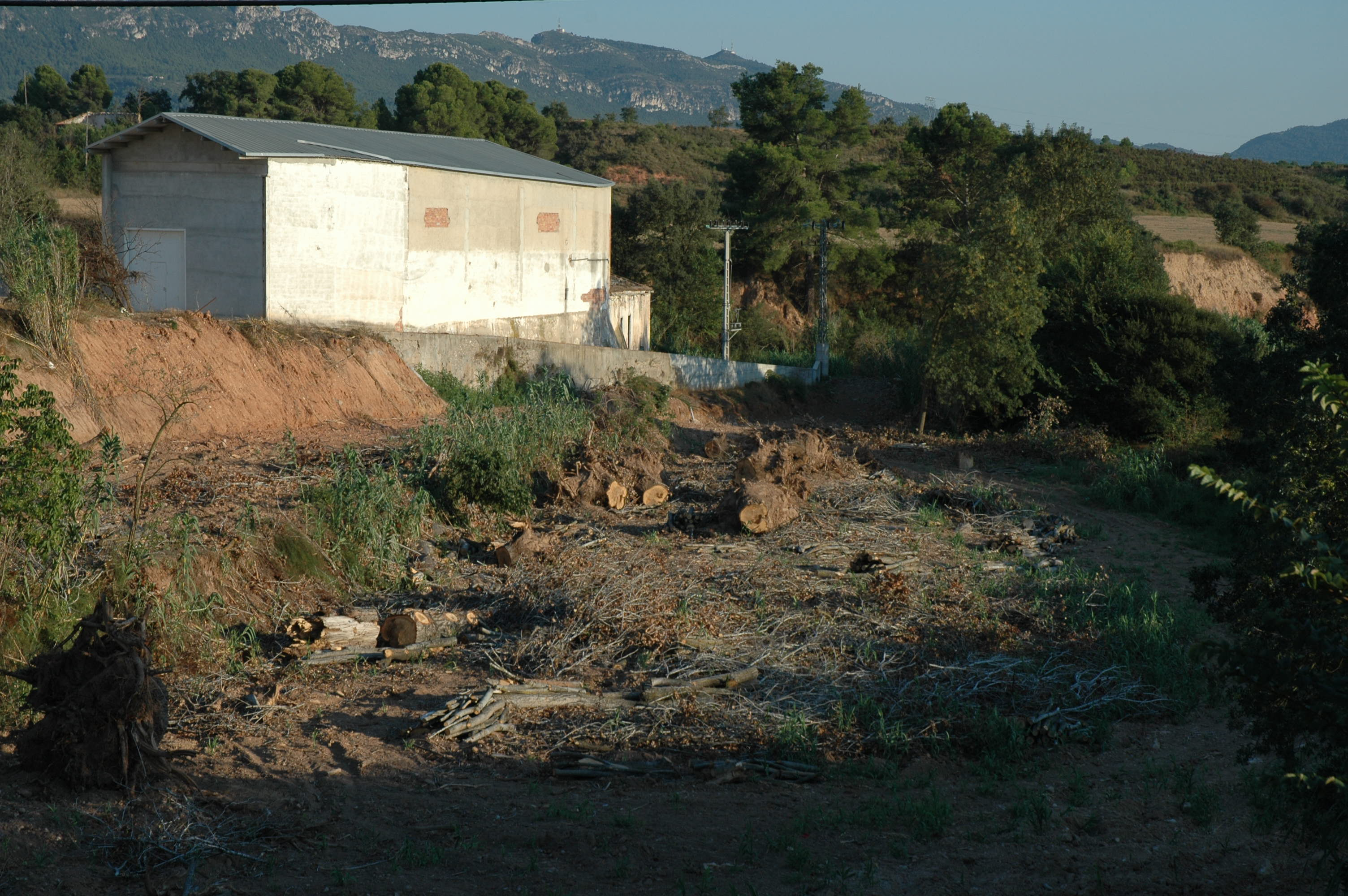 Barberà de la Conca. Molí de l'Amorós amb l'arbreda centenaria tallada, any 2008. Fot. J. Fuguet